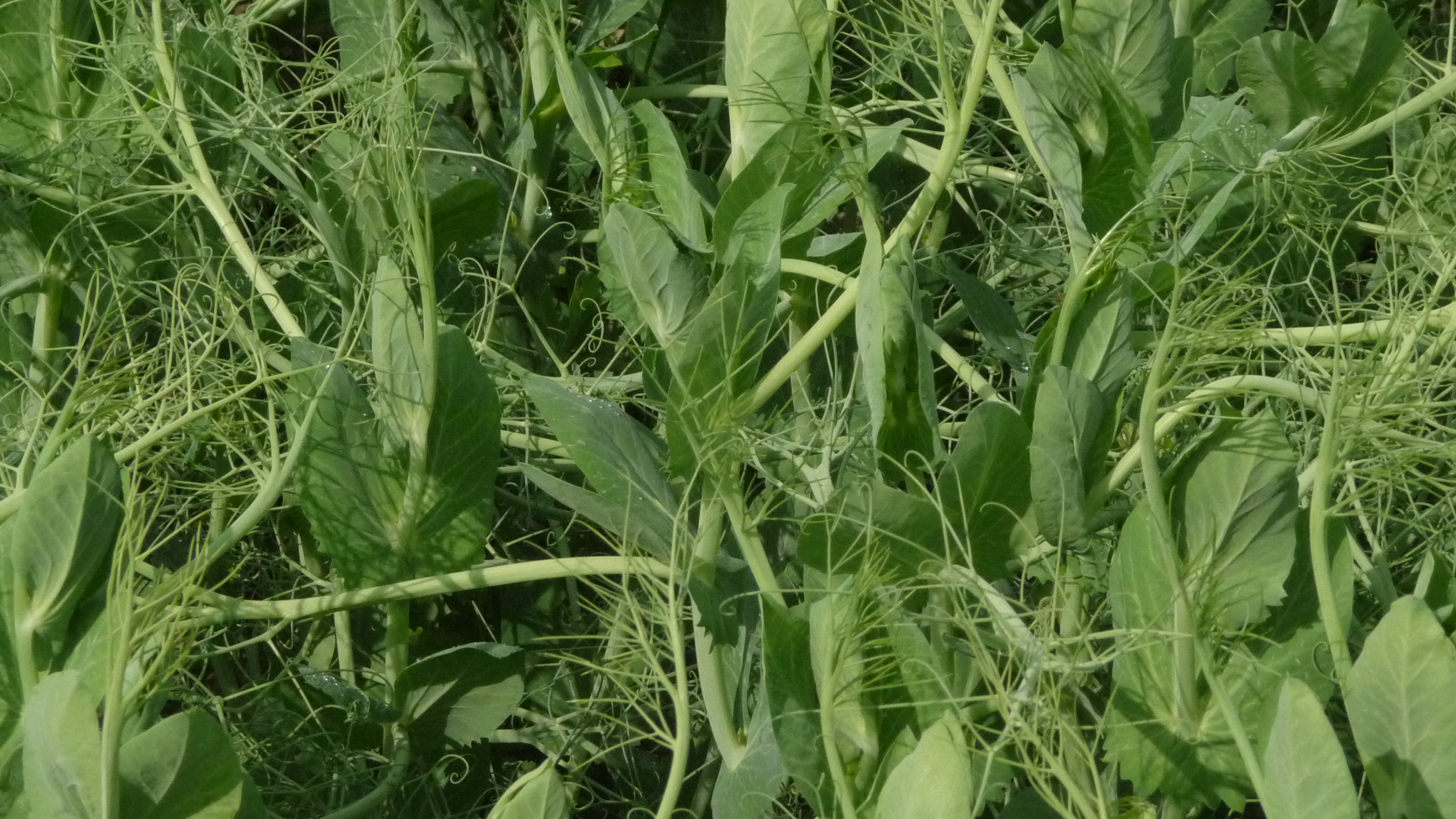 Champ de pois protéagineux type 'afila' à Hargeville (Yvelines, France), début juin 2013